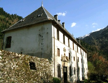 Chartreuse de St. Hugon